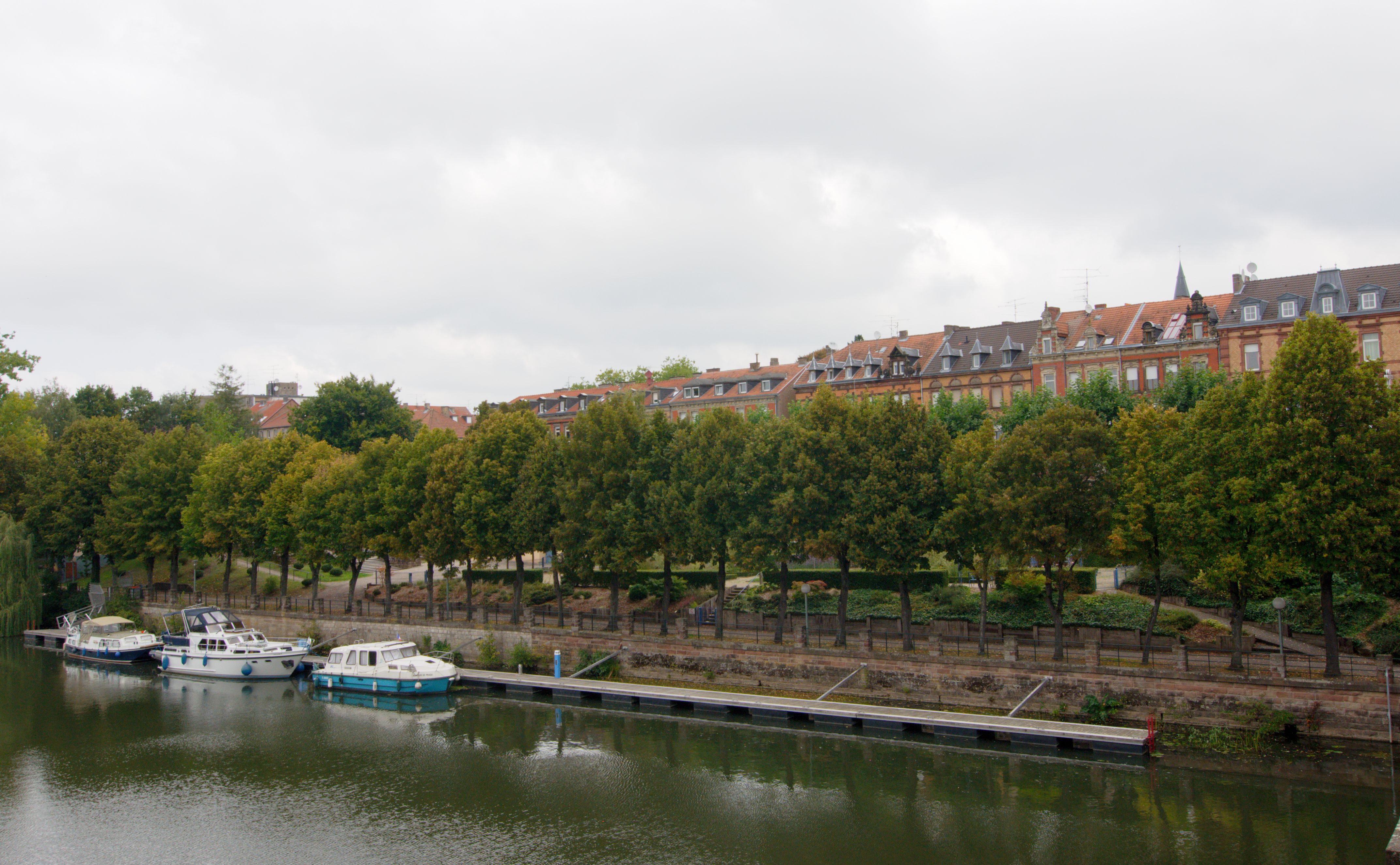 Saarufer in Saargemünd